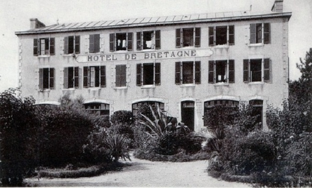 L'hôtel de Bretagne à Locquirec au début du XXe siècle (carte postale non datée avec précision)